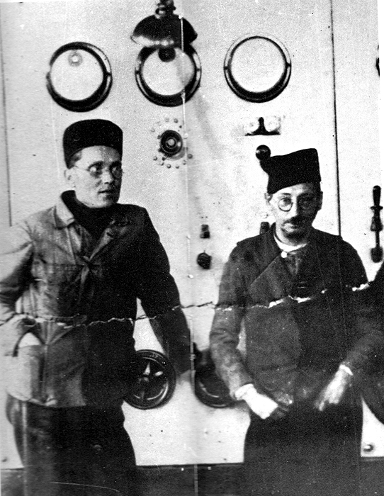 Srpskohrvatski / српскохрватски: Josip Broz Tito i Moša Pijade na robiji u Lepoglavi.